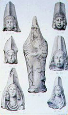 Representación de 1875 de un conjunto de damas mitradas halladas en el santuario ibérico del Cerro de los Santos.